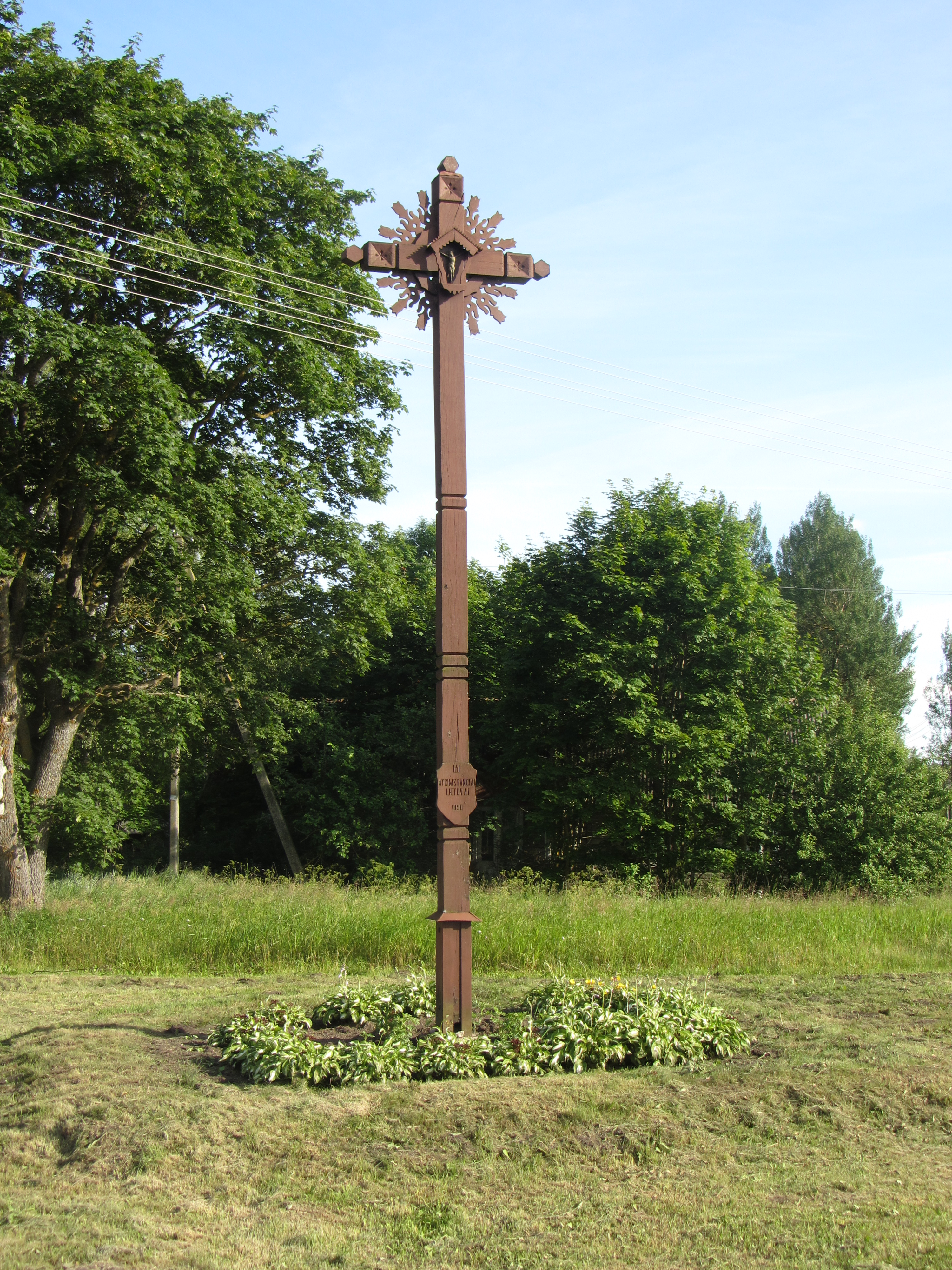 Salomenka, Lithuania